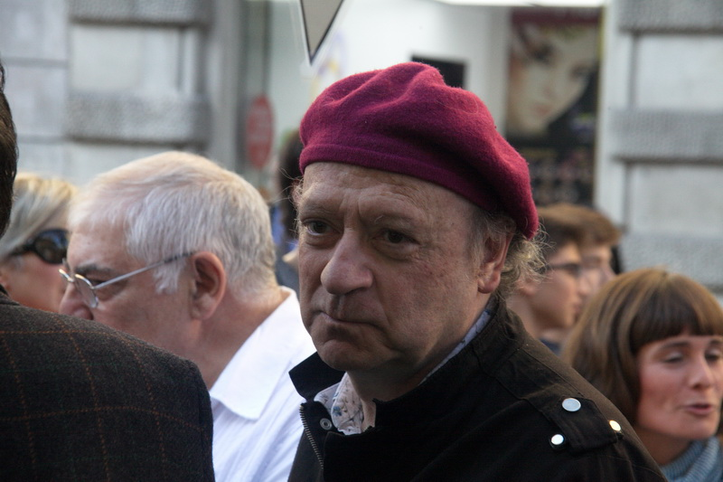 Signatura de llibres en la Diada de Sant Jordi-2015 a Barcelona